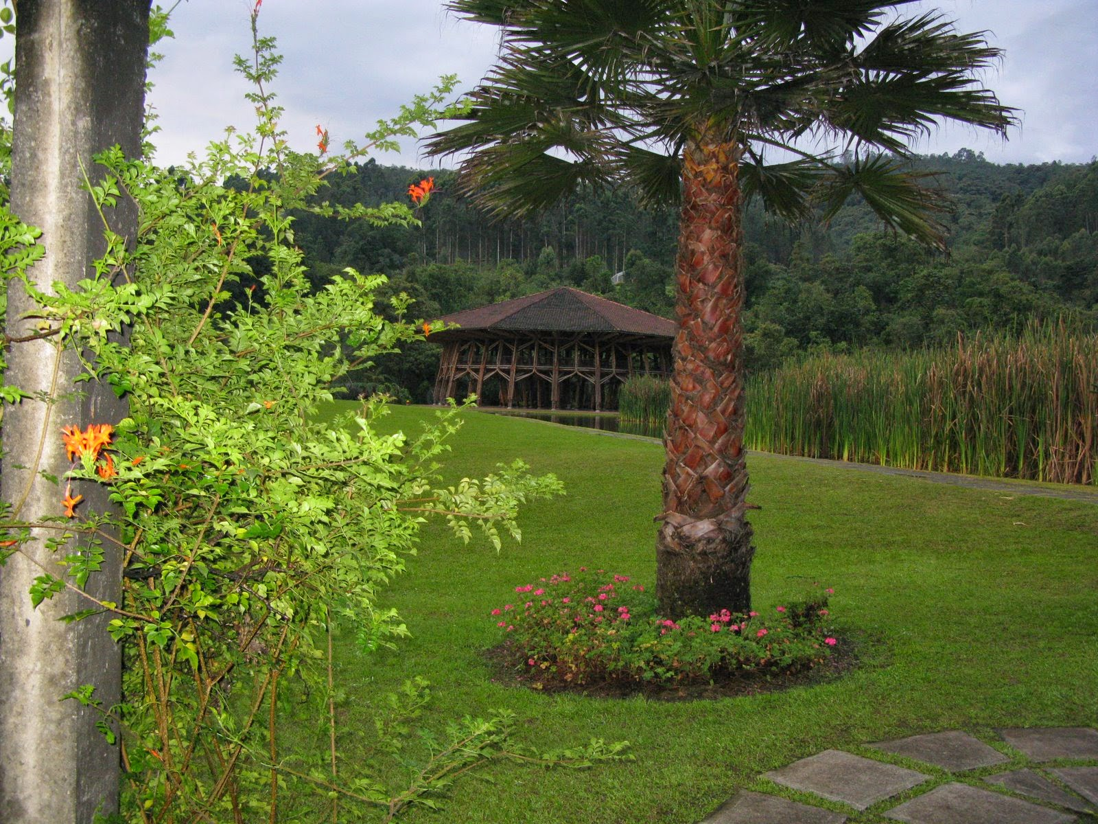 Recinto del pensamiento, un lugar para encontrarse con sigo mismo en la naturaleza.